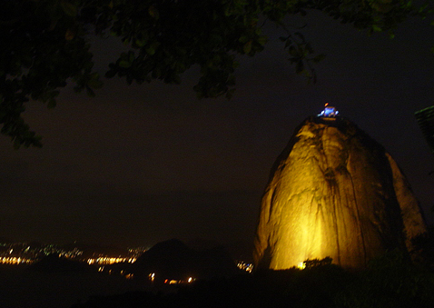 Vista noturna do Pão de Açúcar à partir do morro da Urca. (foto tirada por Paulo Colacino, jun.2004)